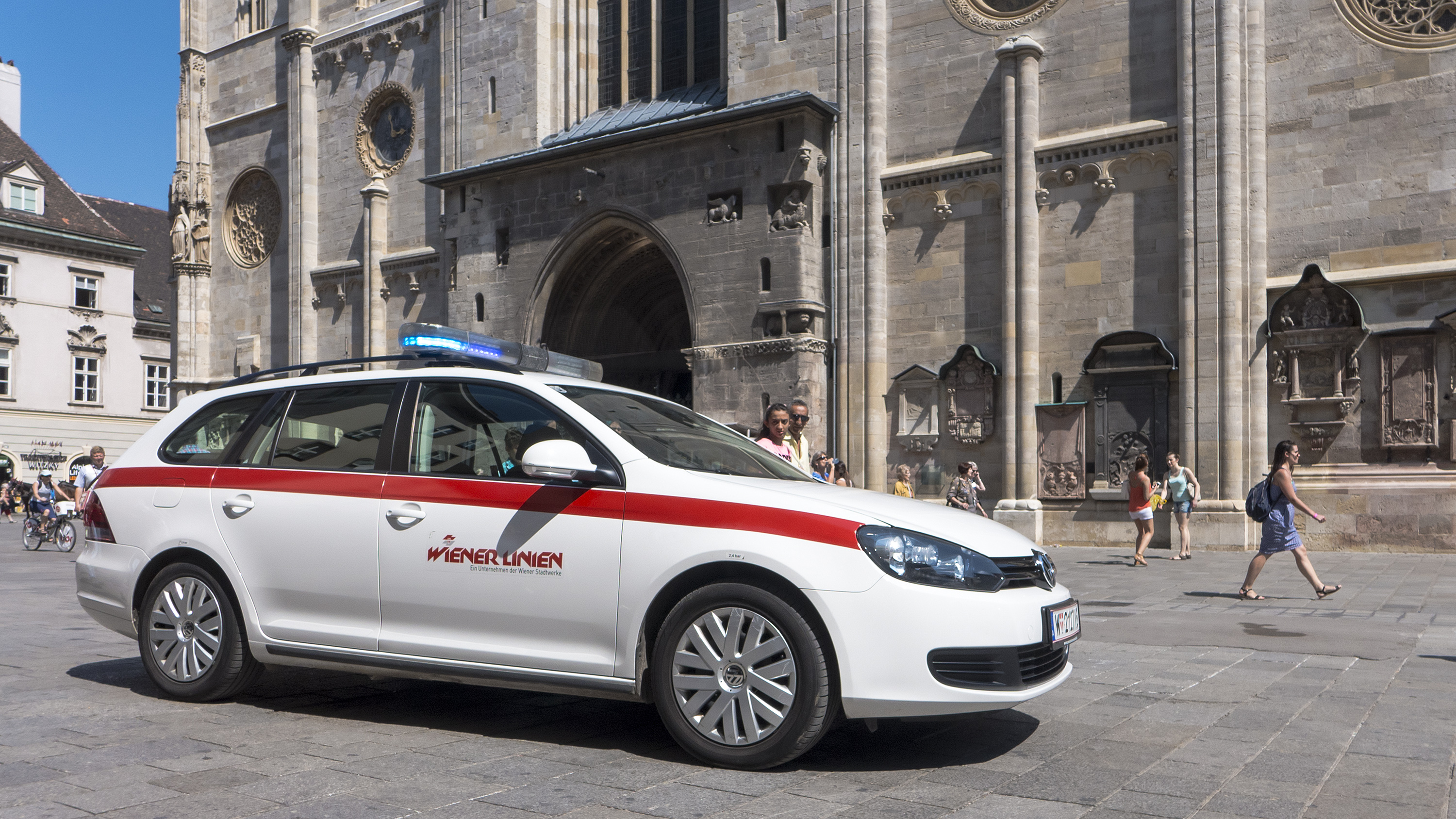 Stephansplatz in Wien 1 bei Nr. 8 Richtung Osten, Einsatzfahrzeug der Wiener Linien